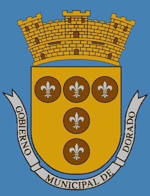 El Gobierno Municipal